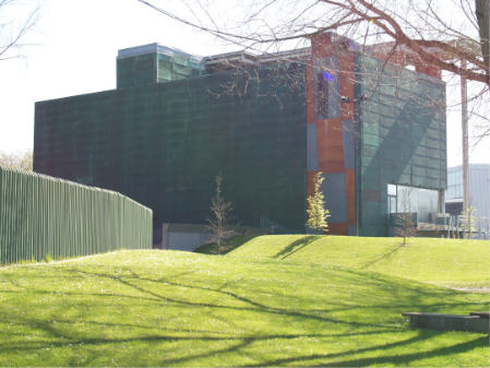 Museo del Pueblo de Asturias